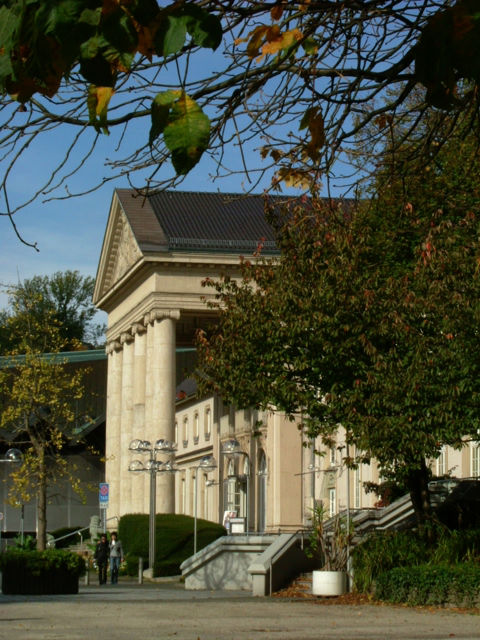 Das Neue Kurhaus in Aachen - heute als Casino genutzt